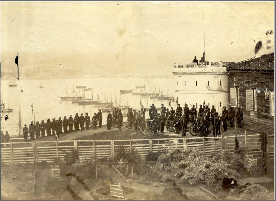 Parada en cerro Artillería en 1863.